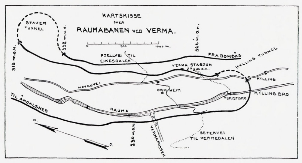 Tunnelene på Raumabanen rundt Verma. Fra Just Broch: «Av Norges statsbaners historie 5: Jernbaneplanen av 1908: Dovrebanen» (1938), s. 96.